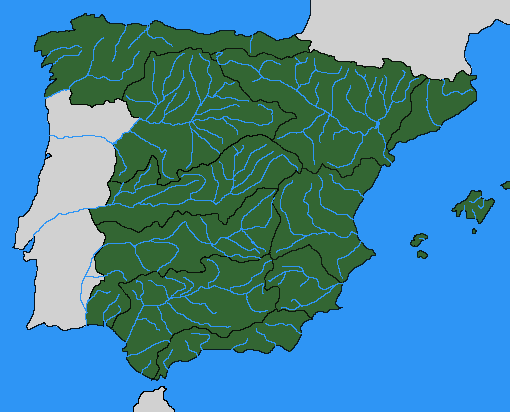 Cuencas hidrográficas de España. Hidrografía España. Ebro, Tajo, Guadiana, Duero. Ríos de España.